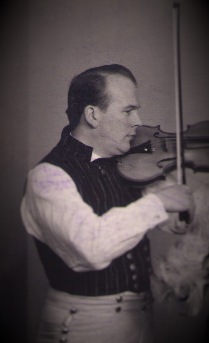 Mauritz Callmyr (född Persson) i Norrby utanför Alfta.